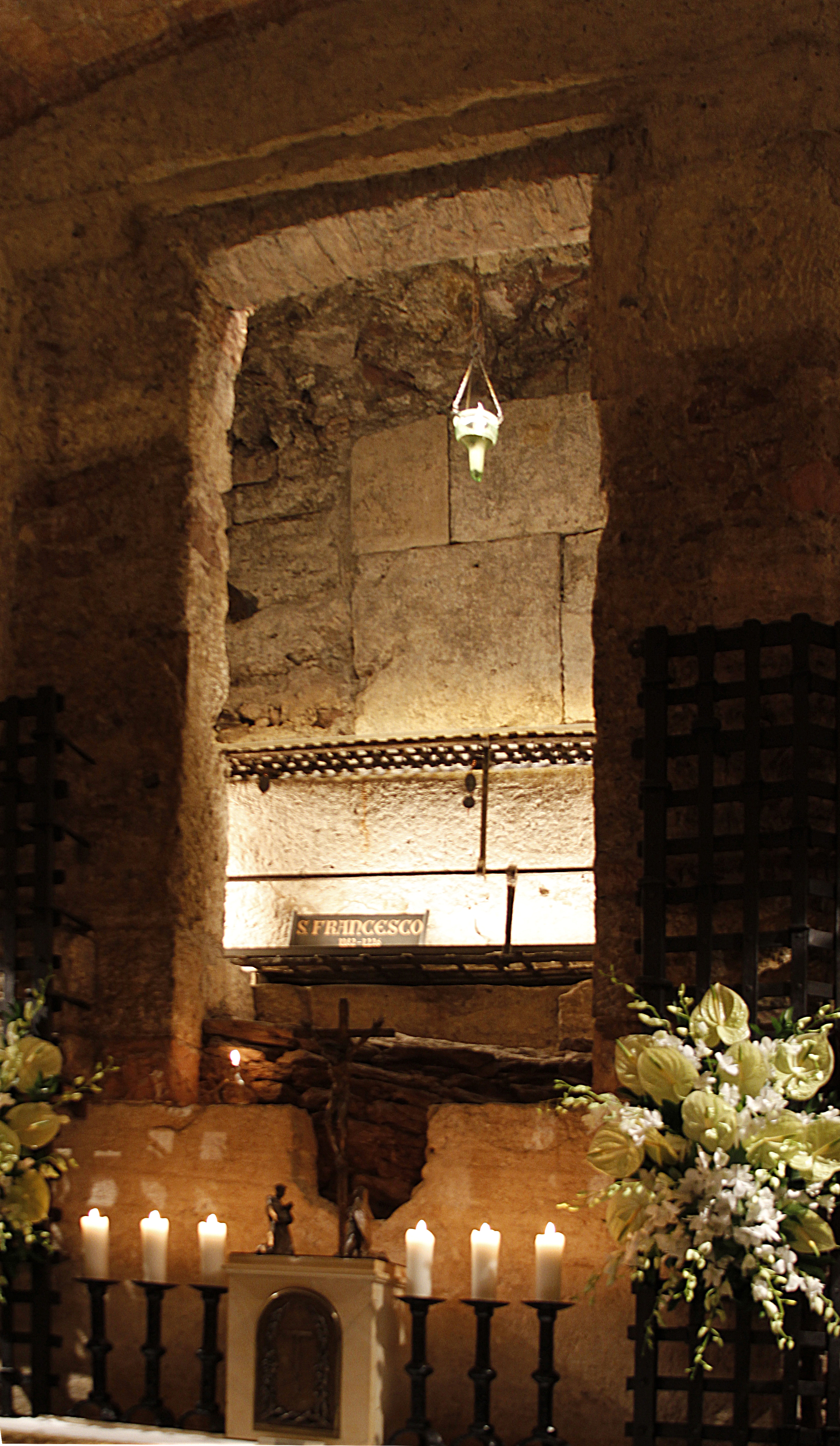 Lower Basilica di San Francesco - Assisi